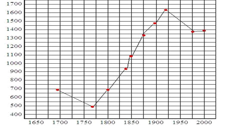 Grafisk fremstilling af Nysteds befolkningsudvikling